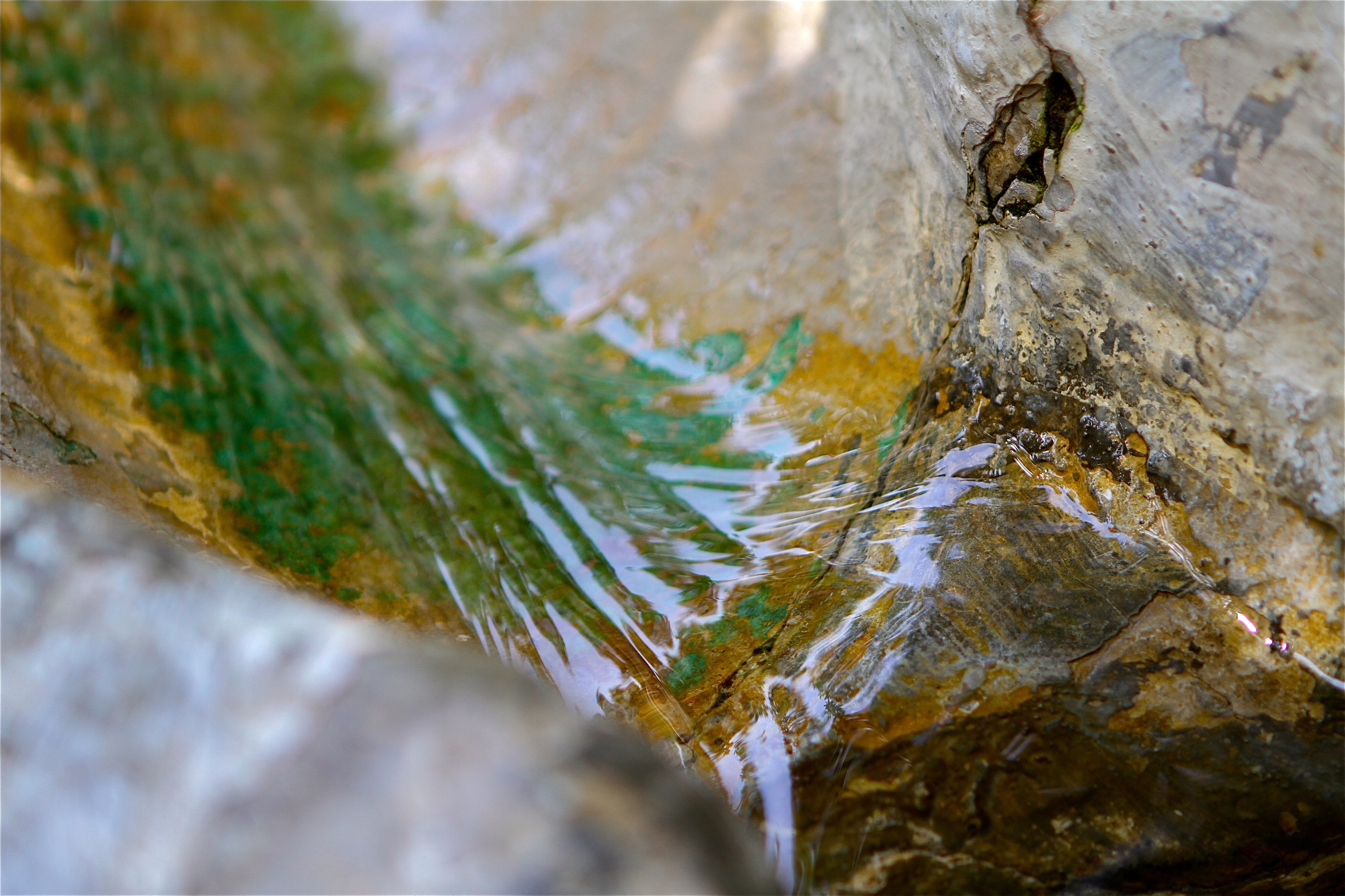 Alhambra